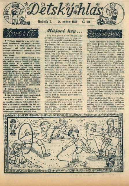 Titulná strana Detského hlasu, príloha novín Slovenský hlas. Detský hlas vychádzal r. 1938.